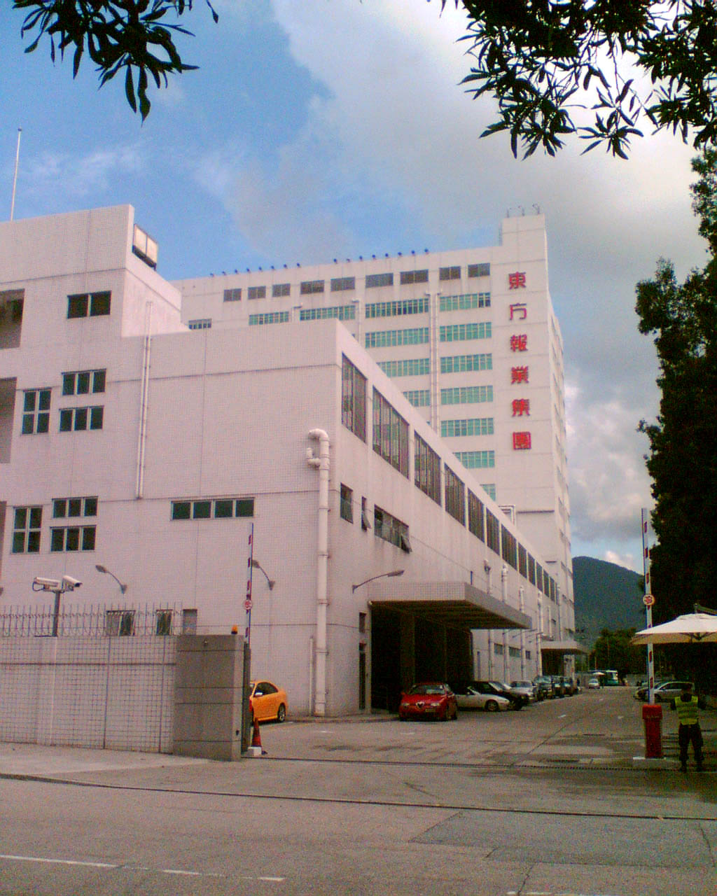 東方報業集團